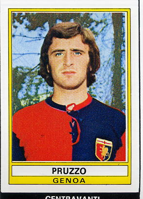 Roberto Pruzzo che indossa la maglia del Genoa